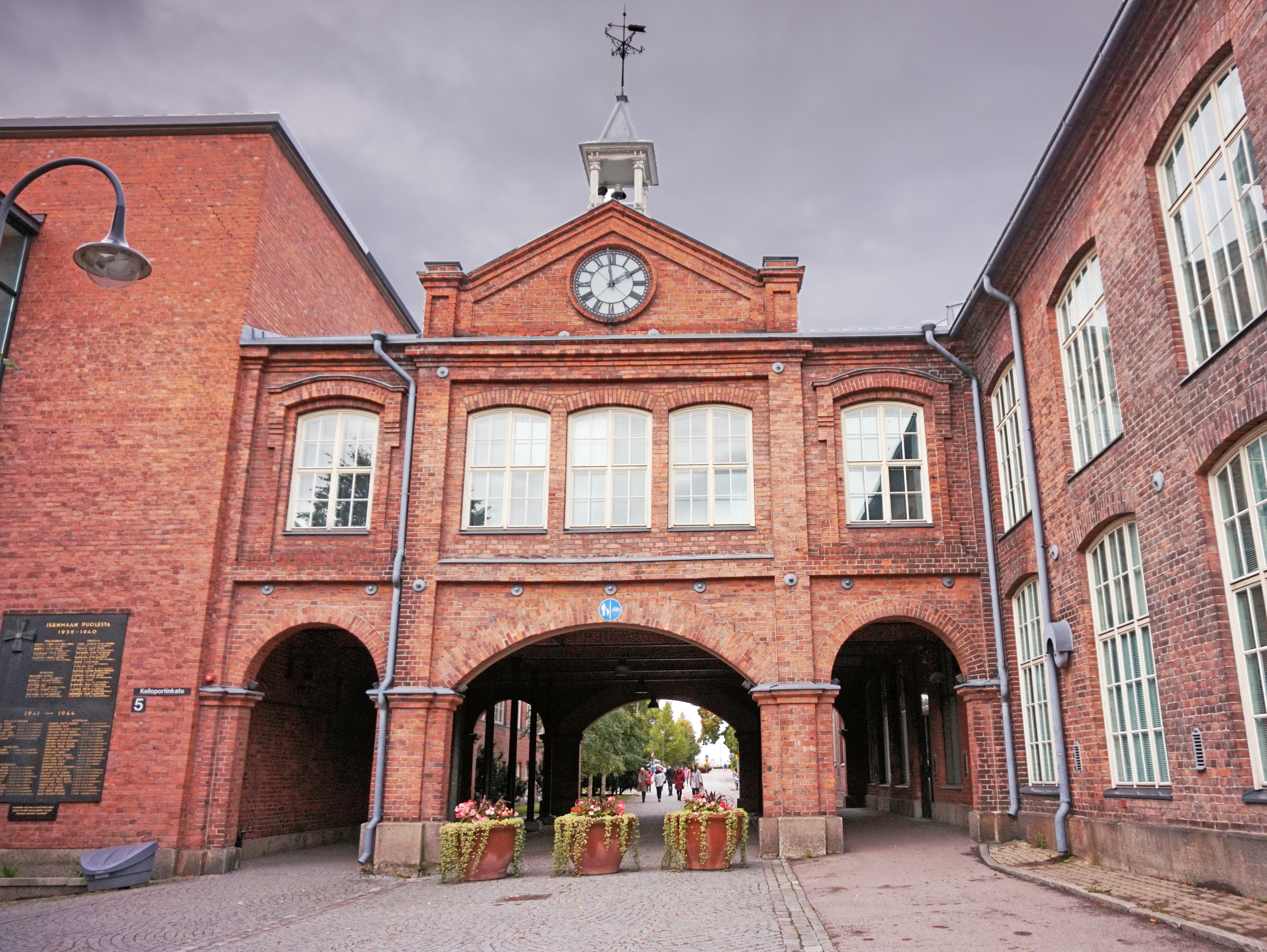 Tammerkosken teollisuusmaisemaa: Kelloportti. This is a photo of a monument in Finland identified by the URL 5021